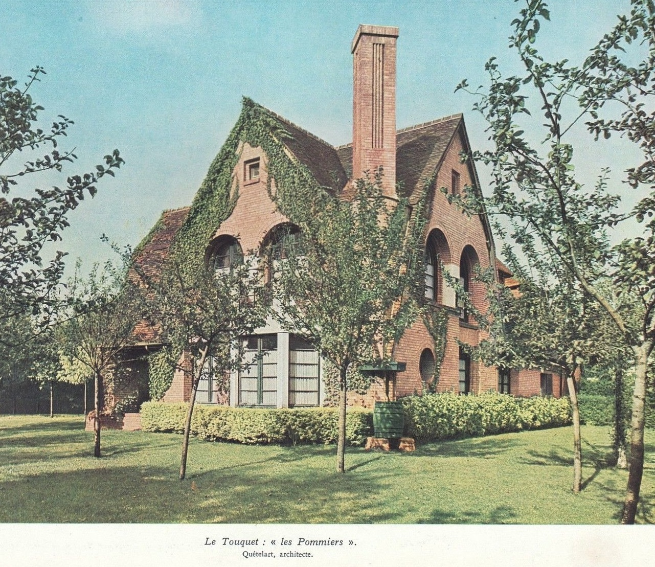 Représentation de la villa Les Pommiers